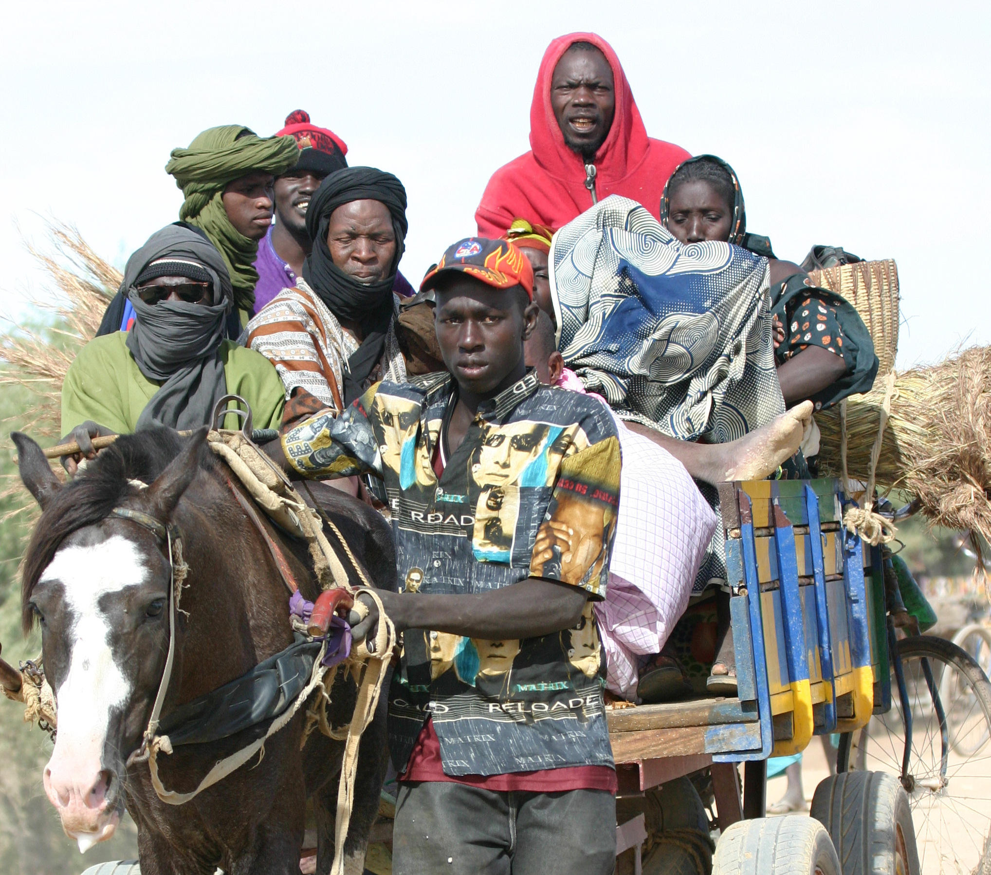 Djenné, Malifamily trip